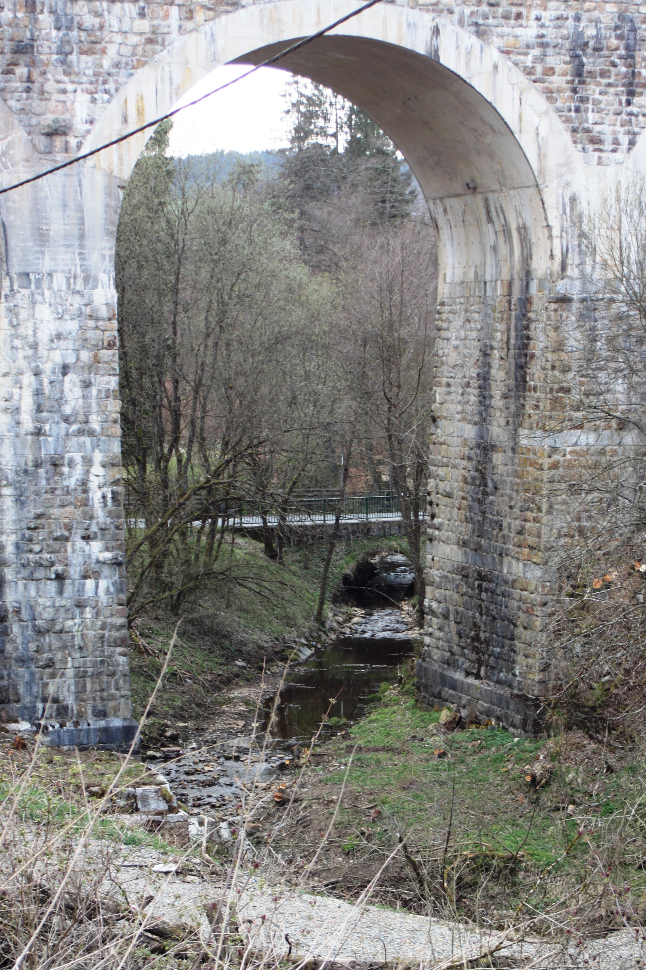 La Kirmessief sous le pont de la Vennbahn près de Reichenstein